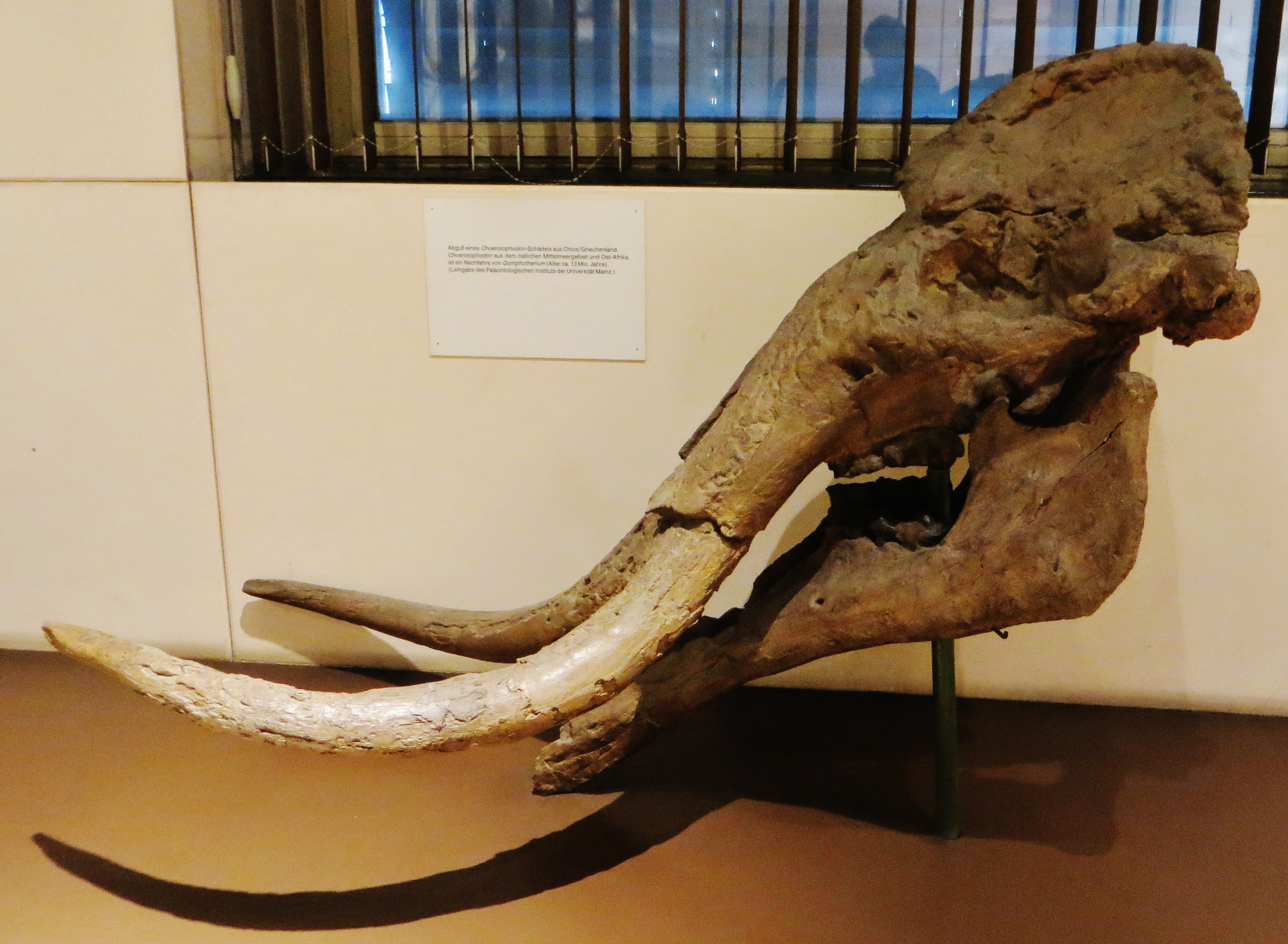 Fossil of Choerolophodon - Took the picture at Natural History Museum, Mainz